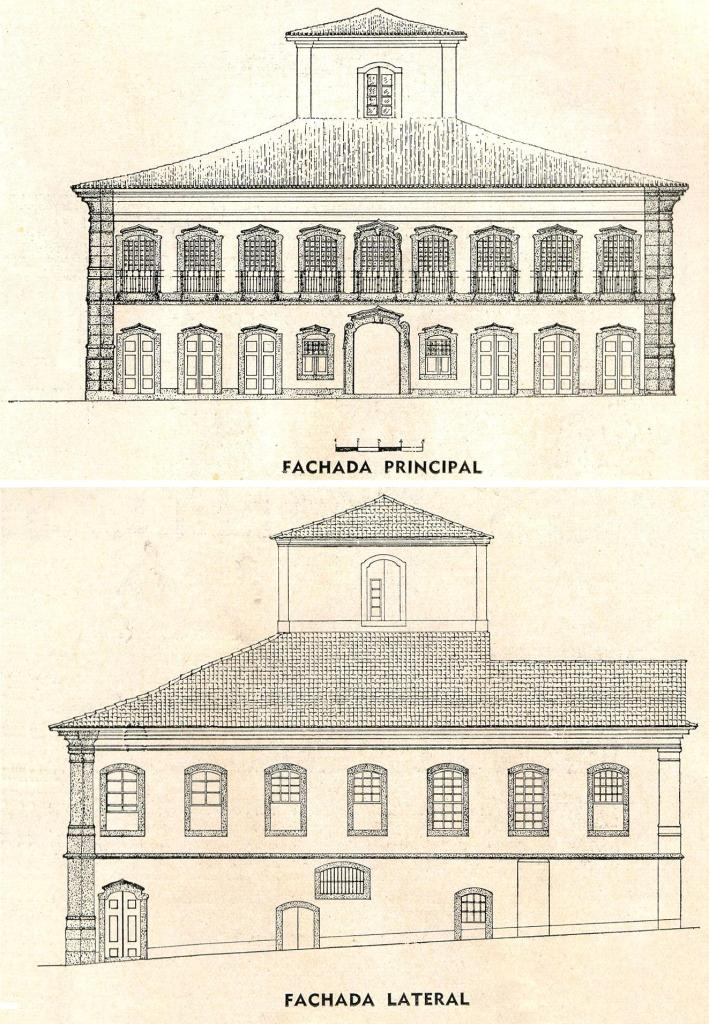 Planta da fachada da Casa dos Contos em Ouro Preto, MG, Brasil